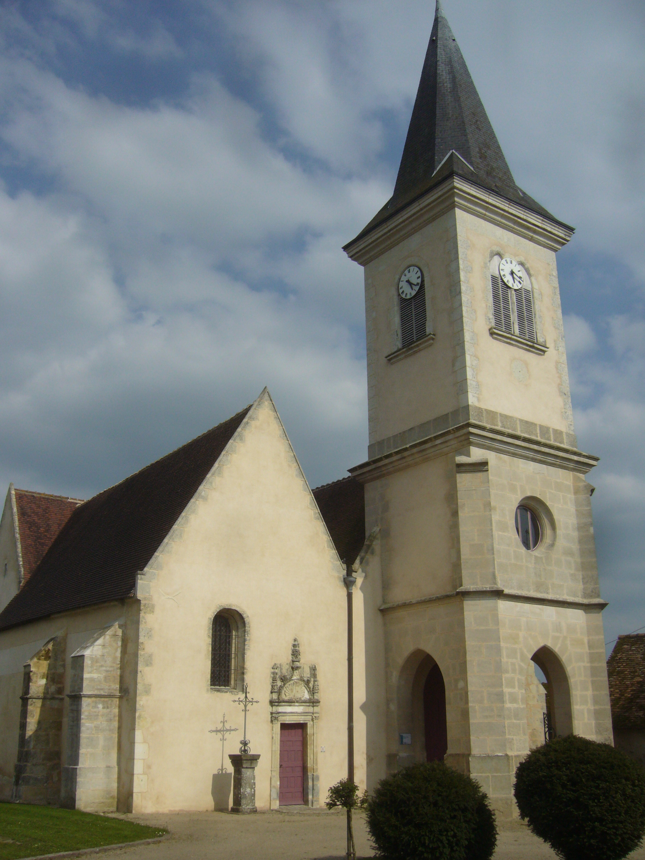 Église Saint-Pierre-et-Saint-Paul de Préval, dans la Sarthe. .